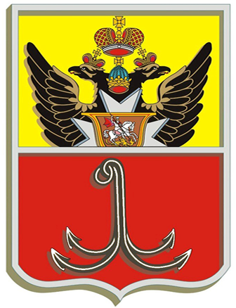 Герб міста Одеси з 1798 року по 1917 рік.